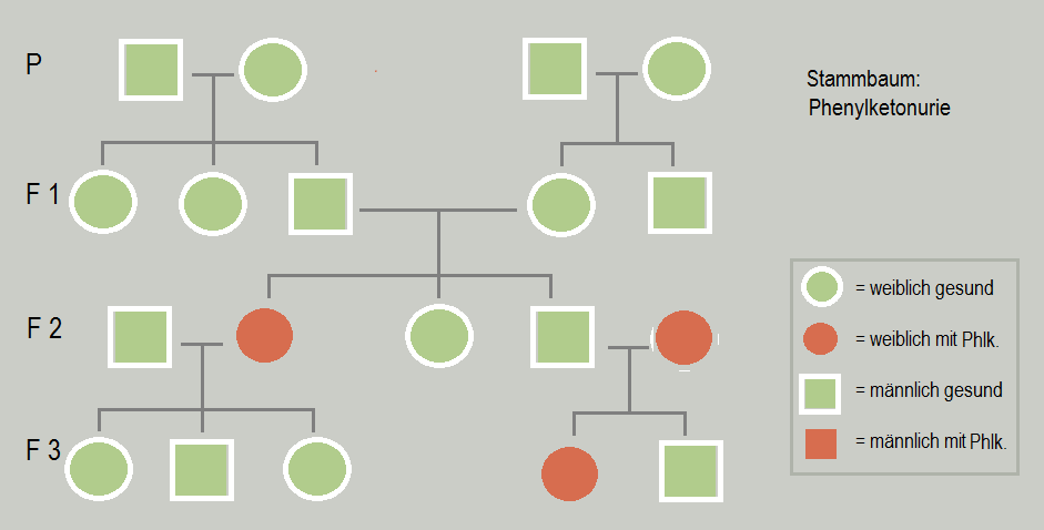 Stammbaumanalyse